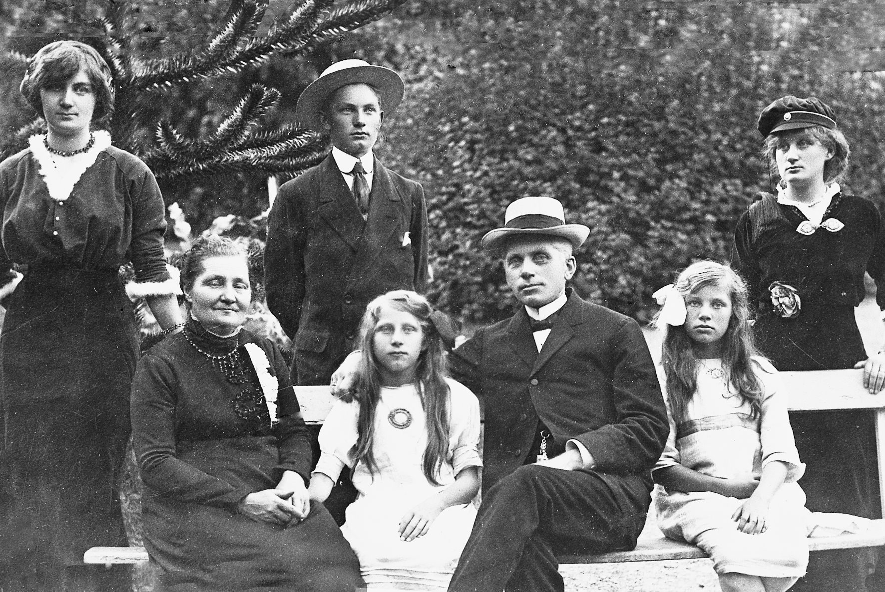 Torgeir D. Bjørnarå (1864-1951) og familien hans. Frå venstre: Tora (189 -1972), mor Aase Helene, fødd Landaas (1863-1954), Ragnar (1895-1986), Borghild (1901-1990), far Torgeir, Solveig (1903-1977) og Dagny (1894-1973). Me ser at Dagny har duskeluve på seg, noko me tek til å tyde at ho har teke artium den våren biletet vart teke. Om me seier at ho var 18 år, lyt det då vera frå sumaren 1912 eller 1913. Bilete frå Ingebjørg Vegestog. Trykt i Heimar og folk i Bykle (2006) b V s 303.